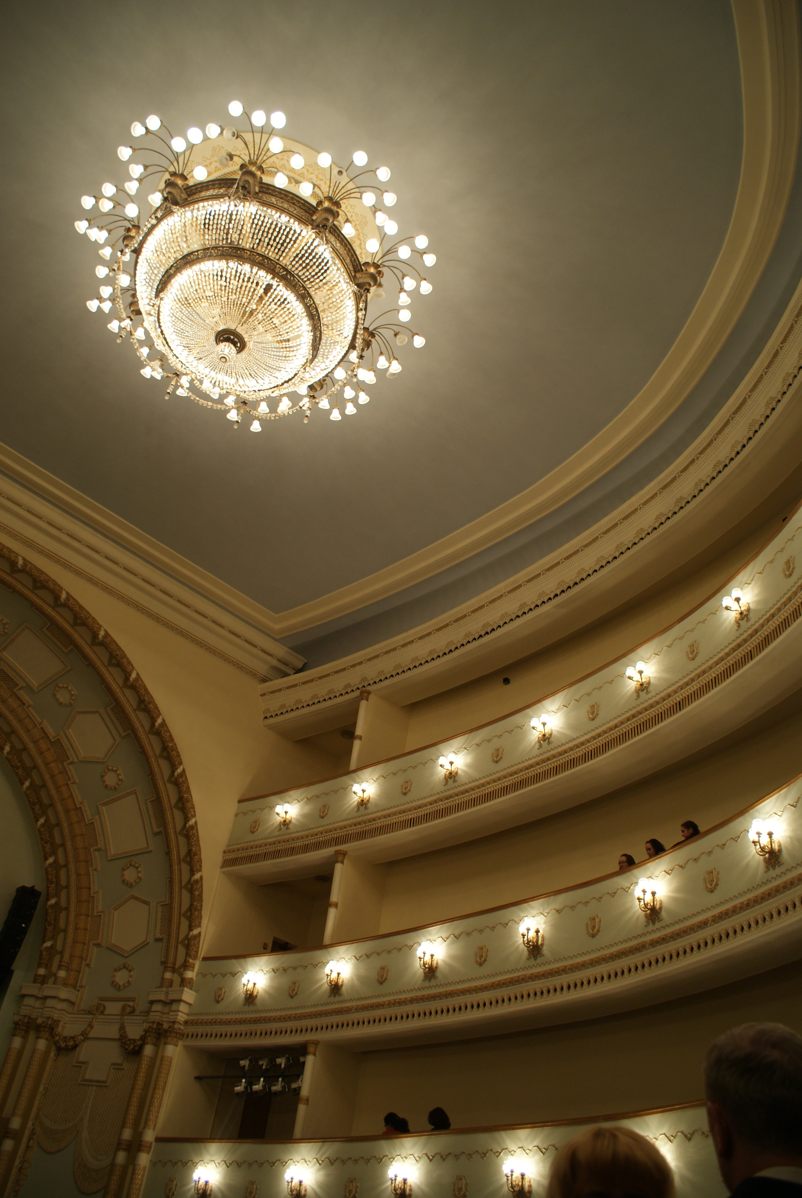 Палац культуры прафсаюзаў. Мінск